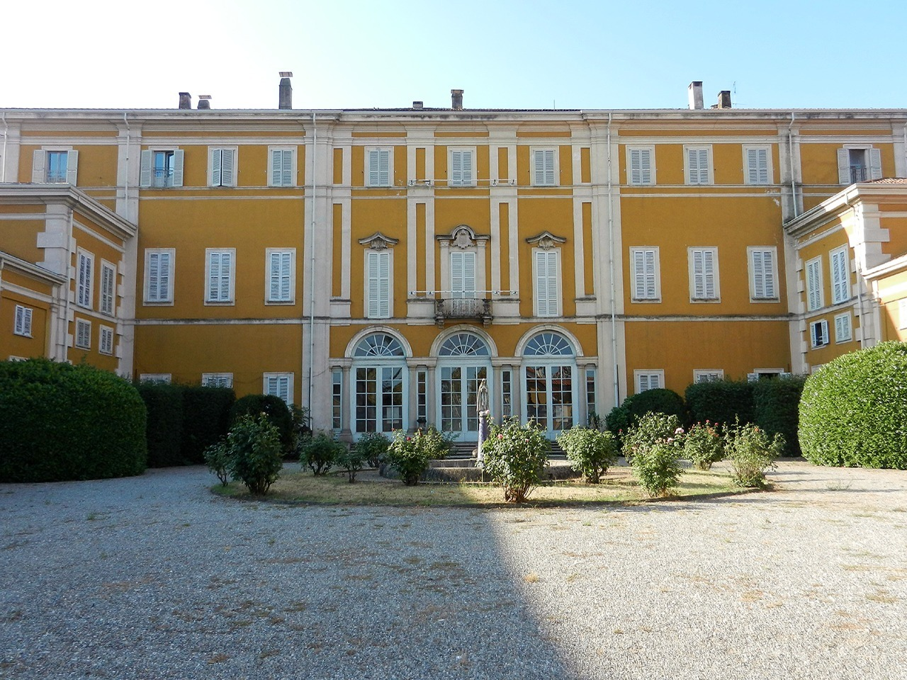 Pessano con Bornago - Villa Castiglioni